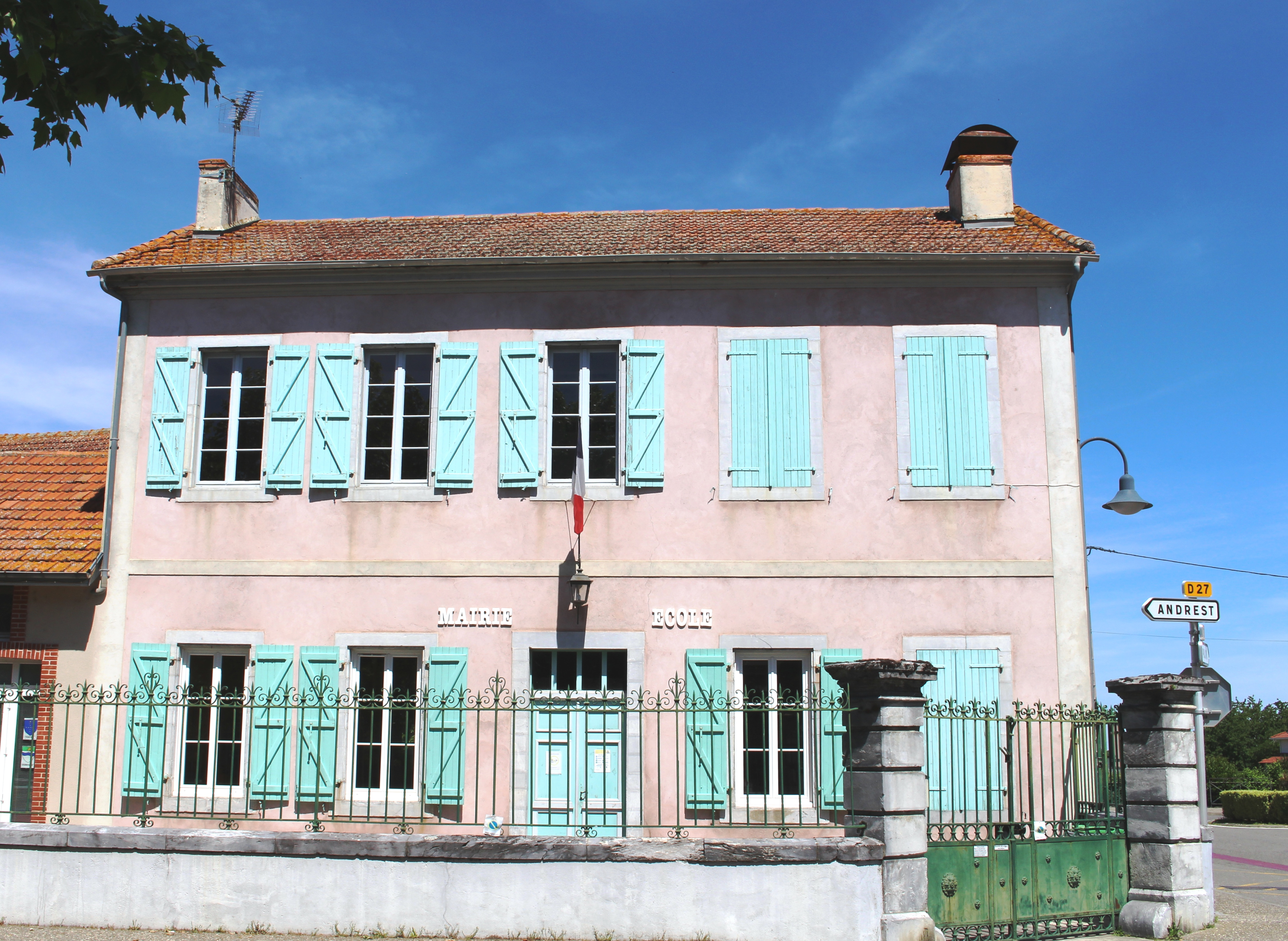 Mairie de Marsac (Hautes-Pyrénées)